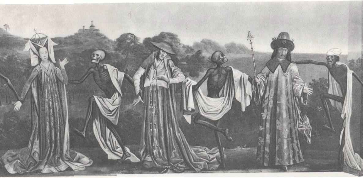 Totentanz Bild 2/9